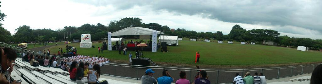 Pre-inauguración de los Juegos Mundiales de 2013 en la Universidad del Valle.